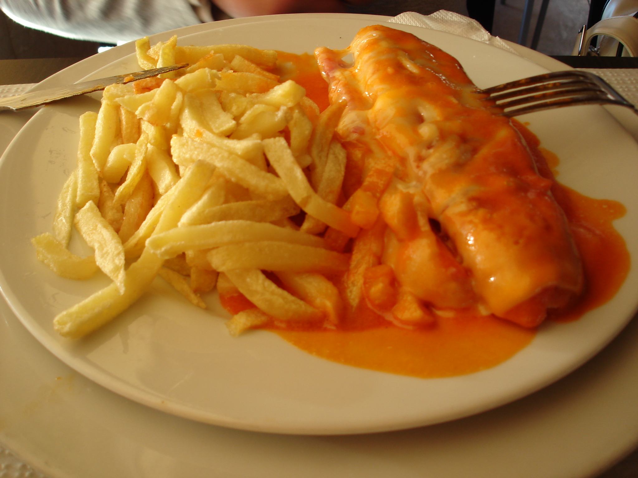 Yummmy!